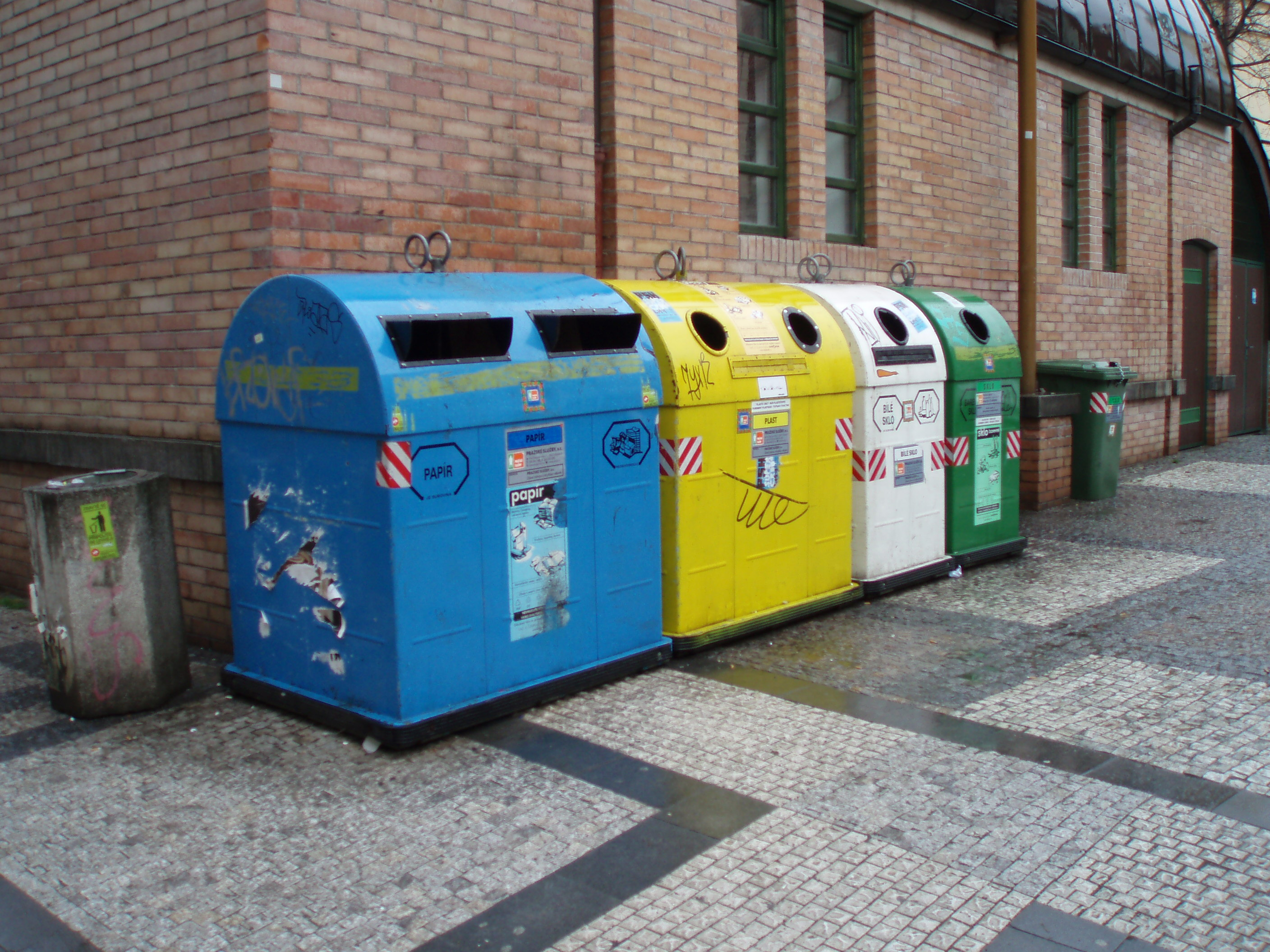 Popelnice na tříděný odpad